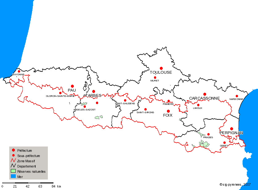 Carte des Réserves Naturelles des Pyrénées